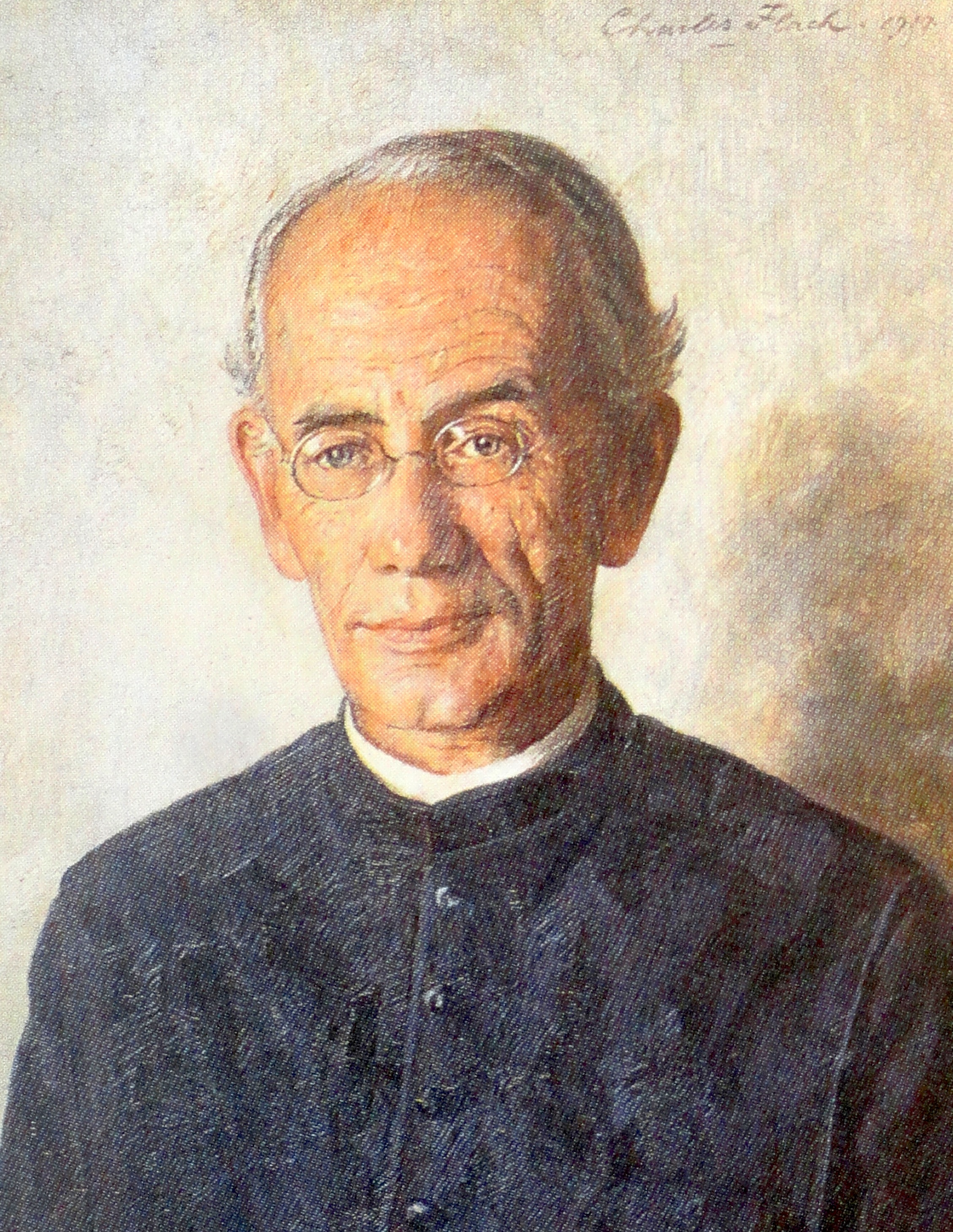 Karl Hager (Pater) 1914; Ölbild von Charles Flach